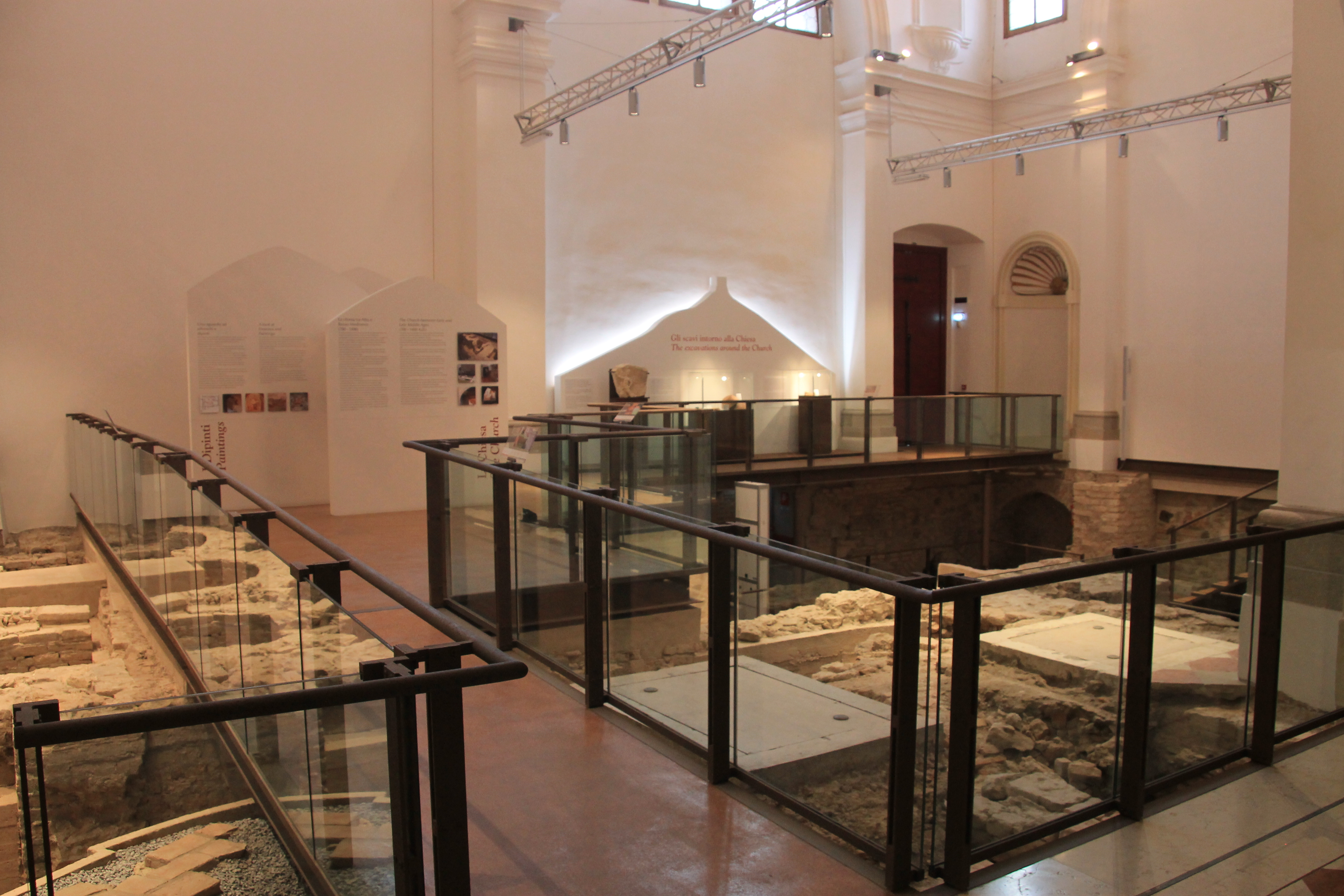 Museo San Paolo, Monselice. Panoramica dell'area archeologica interna all'edificio.